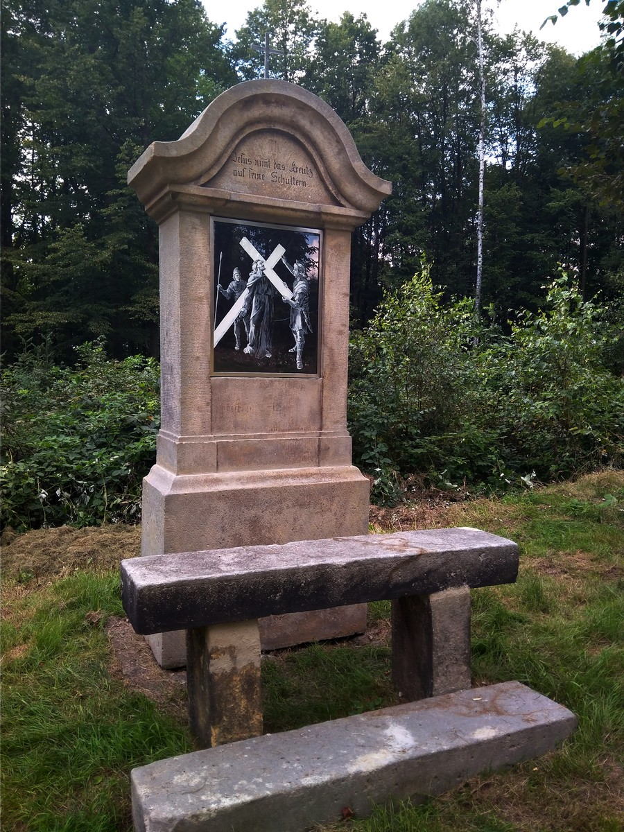 Křížová cesta na Anenském vrchu u Lobendavy